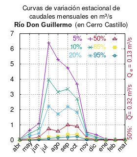 Curvas de variación estacional del río Don Guillermo en Cerro Castillo. # Dirección General de Aguas # Diagnóstico y clasificación de los cursos y cuerpos de agua según objetivos de calidad. Cuenca del río Serrano. # Santiago de Chile # Ministerio de Obras Públicas (Chile) # 2004 # url: # urlarchivo: # Tabla 4.5: Río Don Guillermo en cerro Castillo (m3/s), pág. 28 mes 5% 10% 20% 50% 85% 95% abr 0.078 0.062 0.047 0.027 0.014 0.010 may 0.653 0.431 0.261 0.100 0.031 0.015 jun 1.110 0.745 0.460 0.183 0.059 0.030 jul 6.372 3.953 2.217 0.734 0.188 0.085 ago 5.288 3.154 1.715 0.593 0.235 0.176 sep 4.739 3.355 2.208 0.992 0.370 0.208 oct 3.682 2.696 1.848 0.898 0.369 0.219 nov 0.526 0.416 0.309 0.167 0.063 0.026 dic 0.360 0.204 0.104 0.033 0.014 0.011 ene 0.055 0.043 0.032 0.018 0.009 0.006 feb 0.036 0.032 0.028 0.021 0.014 0.010 mar 0.049 0.040 0.031 0.019 0.010 0.007 This plot was created with Gnuplot.